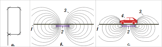 Detectielus. a. Lus lay-out, b. Onverstoorde toestand, c. Verstoorde toestan